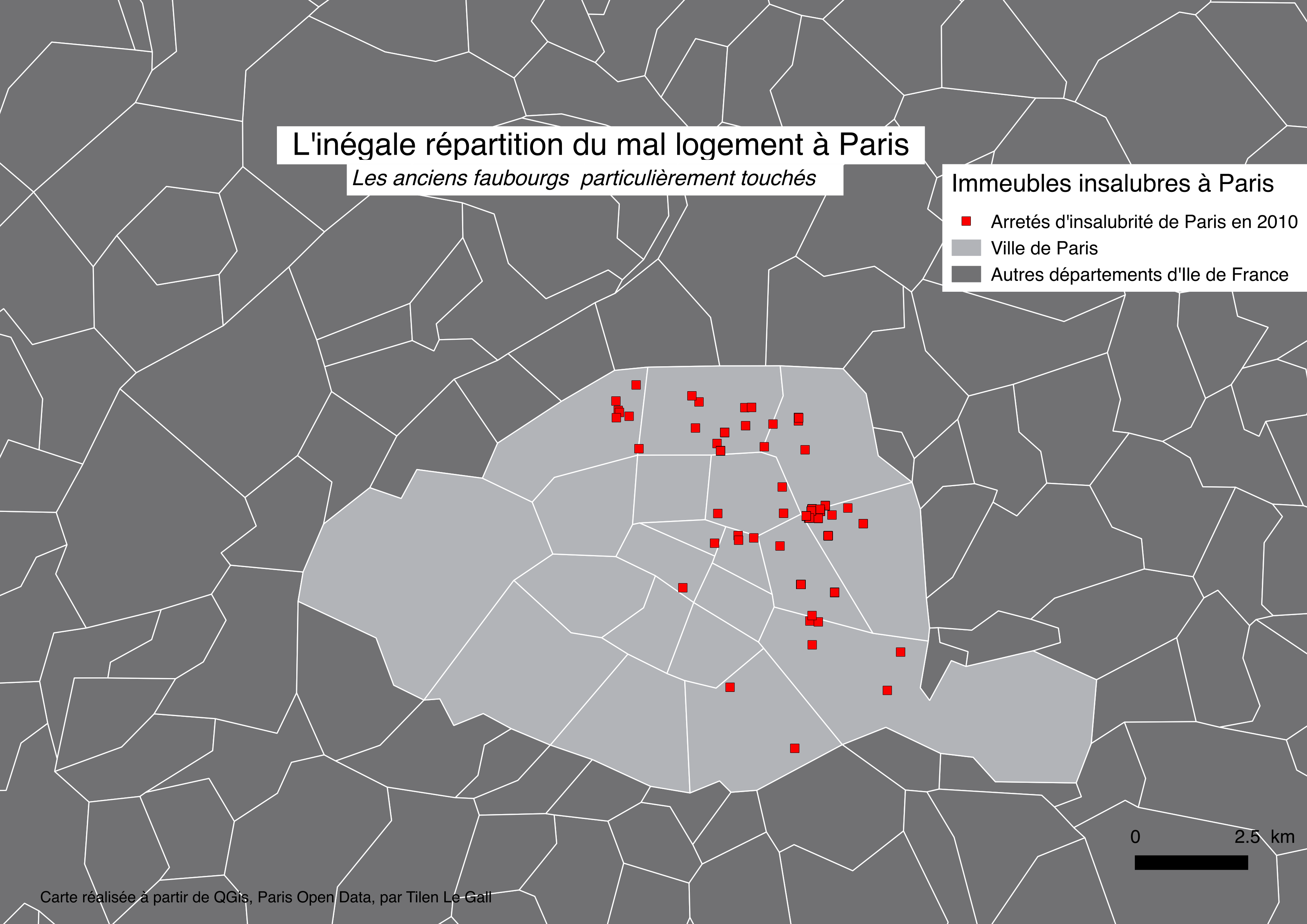 Illustration des arrêtés d'insalubrité pris à Paris en 2010